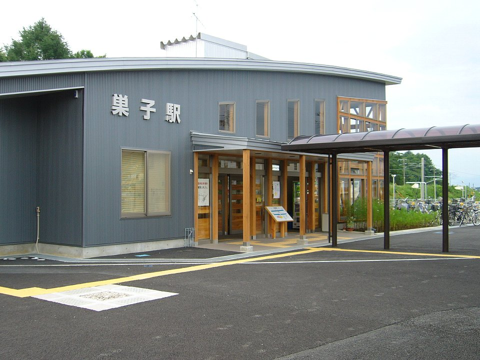 Sugo Station, Takizawa, Iwate, Japan